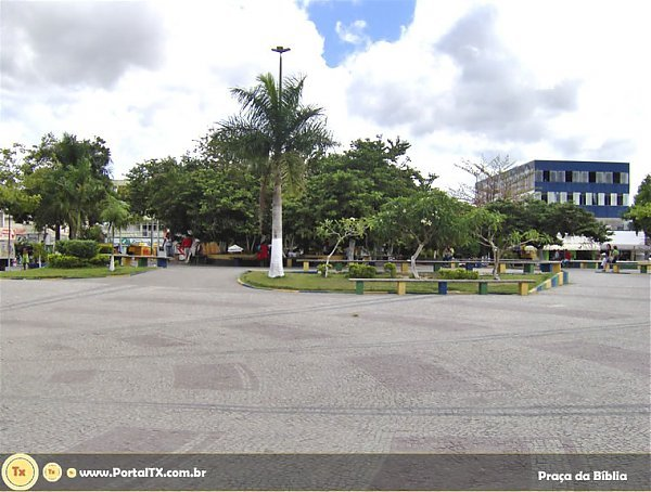 praça da biblia